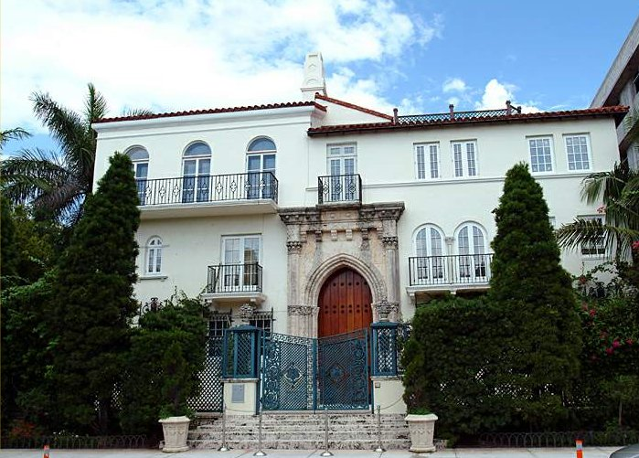 Villa du couturier Giani Versace à Miami Beach en Floride